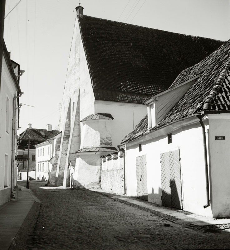 Muuseumikogu Negatiivide kogu Muuseumikogu Negatiivide kogu linnaelu ehitatud 1641 - 1651, arhitekt H. Skrintner, Z. Hoffmann. Kiriku ots Koidu tänaval. Kivisillutisega tänav, majad kahel pool, keskel kirik; Eesti Narva